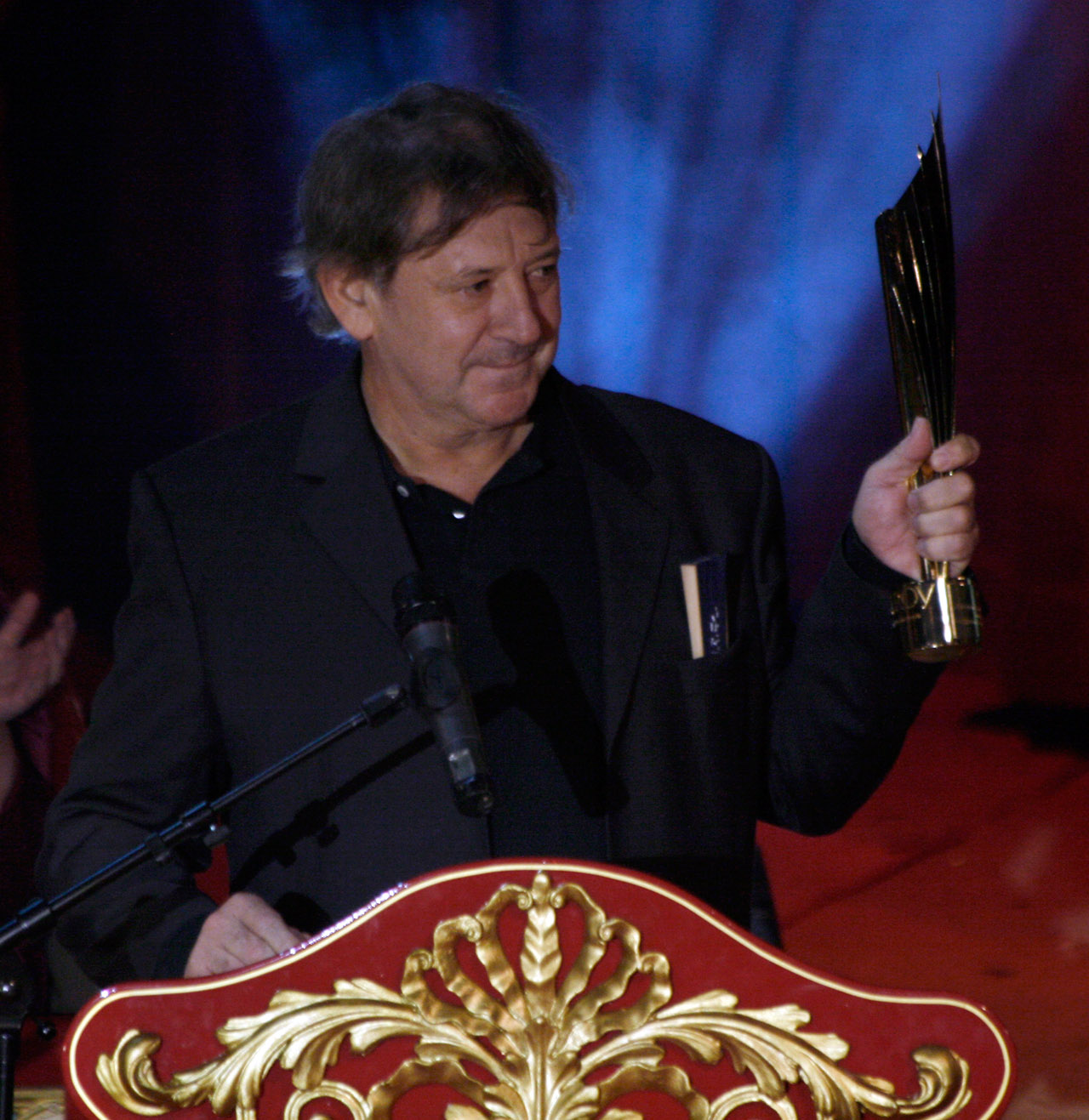 André Jung, ausgezeichnet als Bester Schauspieler, während der Verleihung des Nestroy-Theaterpreises 2009 (Circus Roncalli auf dem Wiener Rathausplatz).